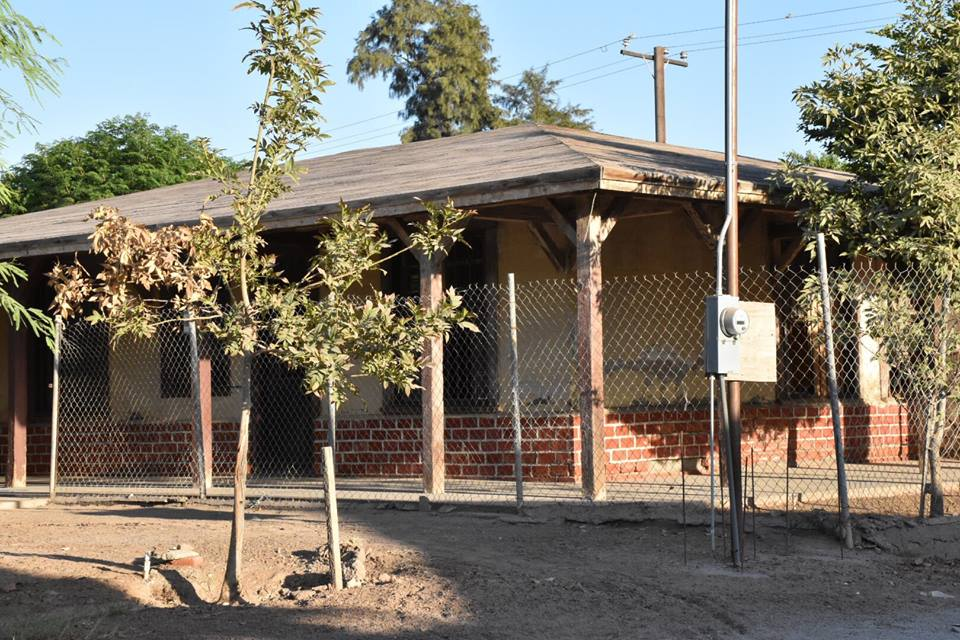 Antigua Estación de Tren